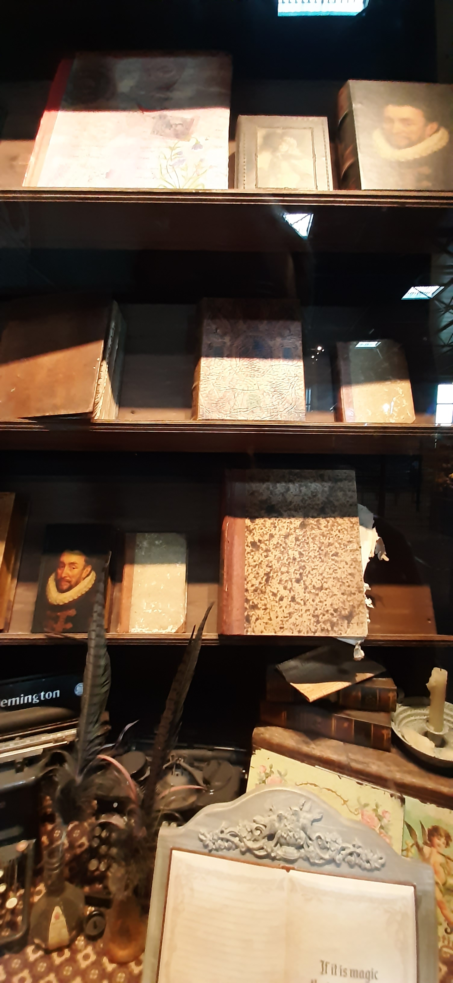 Decoratie in de vitrines onder de waterglijbanen in het themagebied Land van Toos in Attractiepark Toverland.